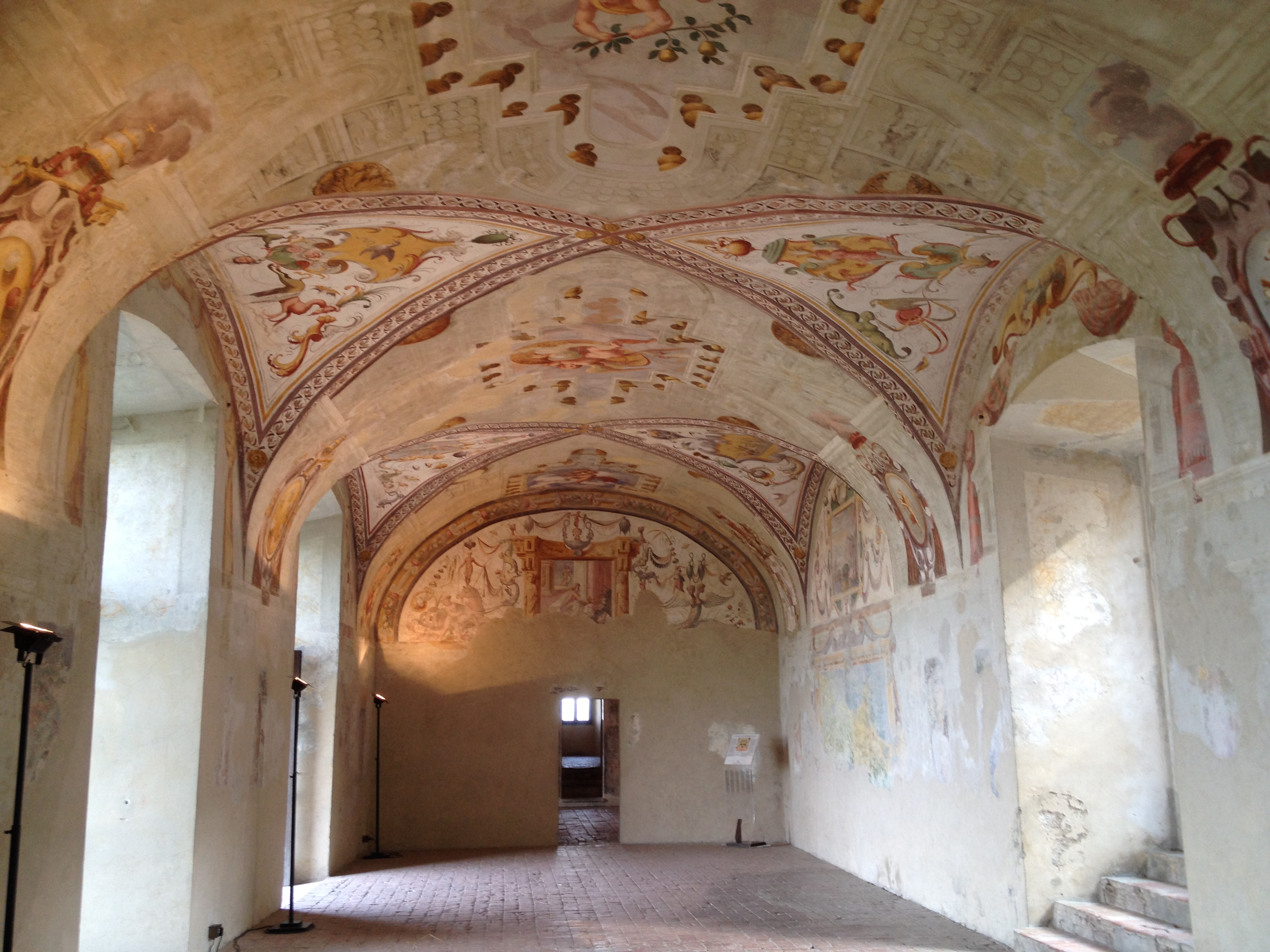 Castello di Torrechiara - MIBAC This is a photo of a monument which is part of cultural heritage of Italy.